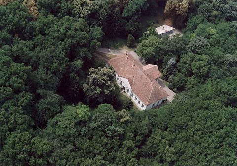 Tengelic, Hungary, aerialphotgraphy